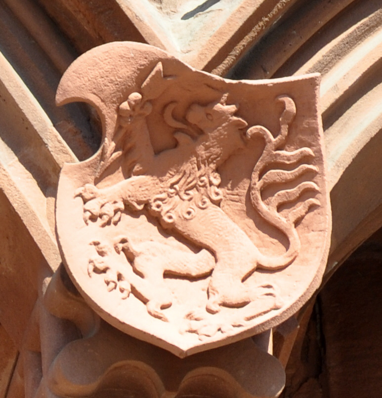 Frankfurt am Main, Rathaus (Römer), Haus zum Römer, Fassade, Wappen am Balkon, obere Reihe, Nr. 10: Familie Orth